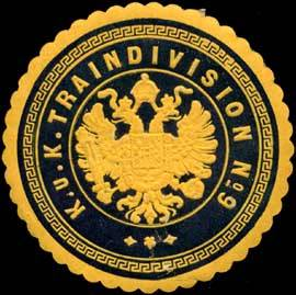 Sealing stamp Title: K.u.K. Traindivision No. 9 Description: Eisenbahn, gelb, schwarz, geprägt Place: size: 4 cm